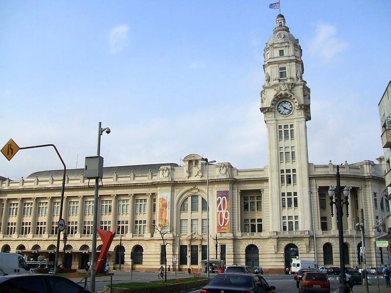 Estação Júlio Prestes, no bairro do Bom Retiro, São Paulo, Brasil.